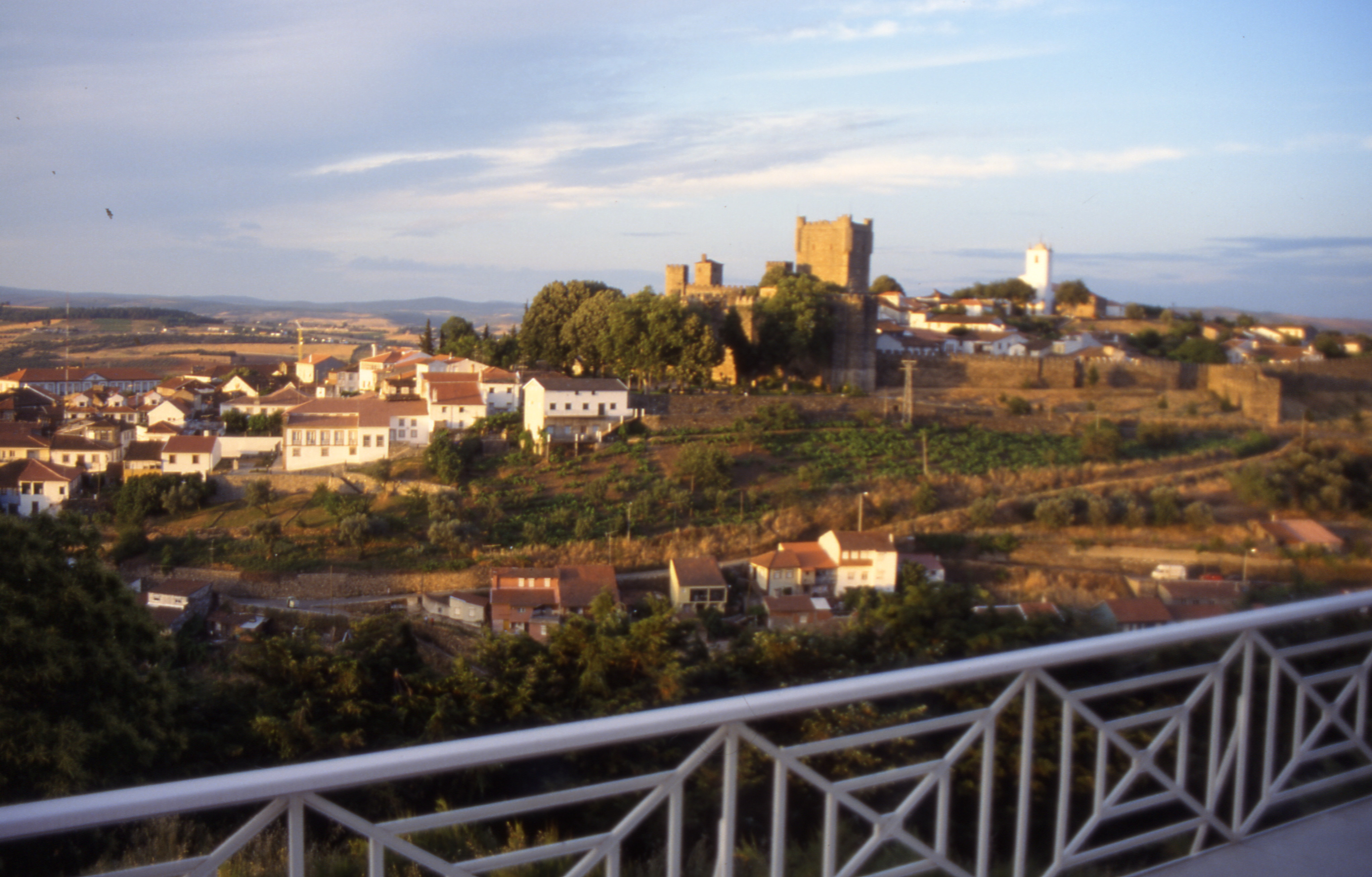 Braganca Ansicht